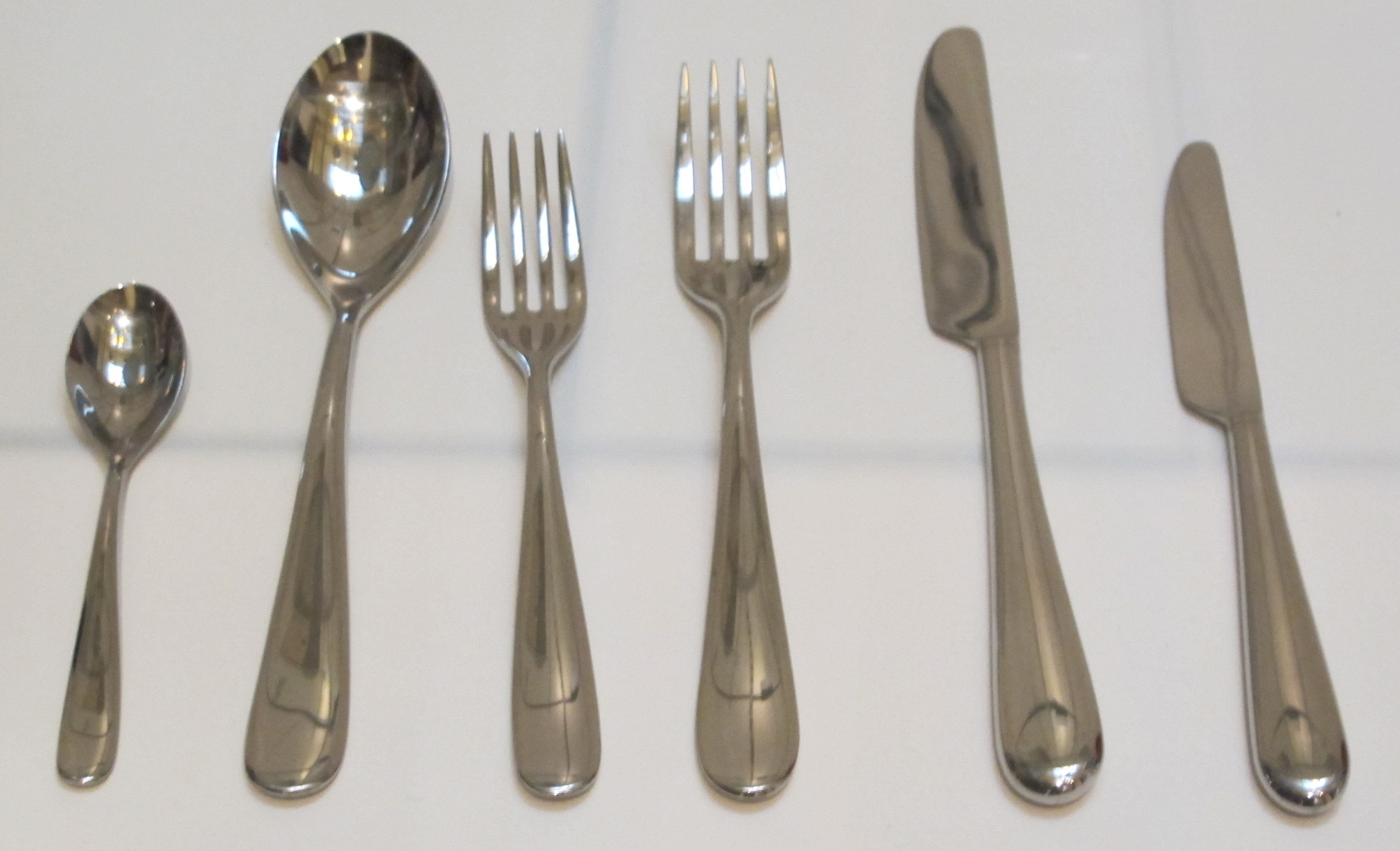 Posate nuovo milano di ettore sottsass, 1987